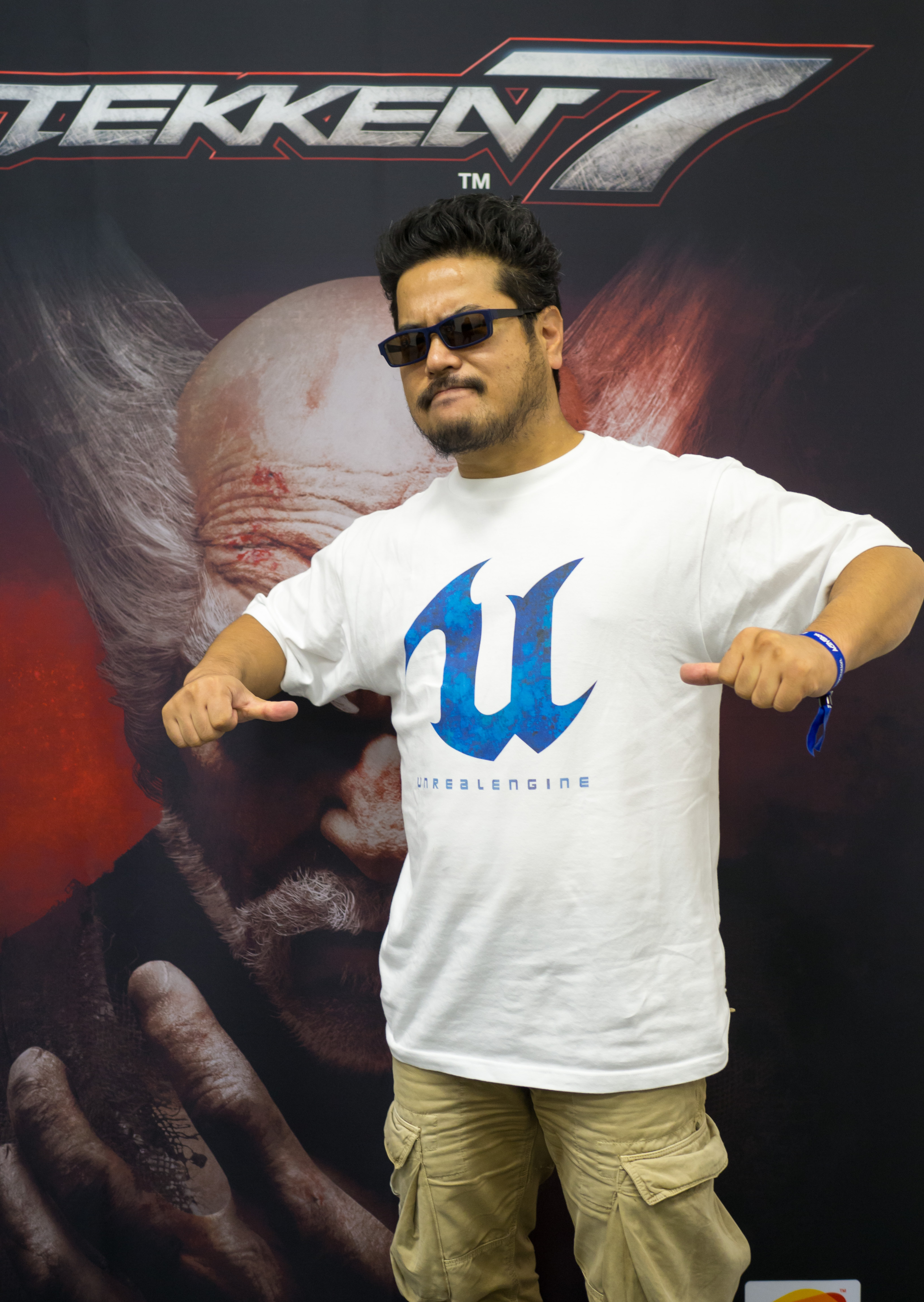 Igromir 2016